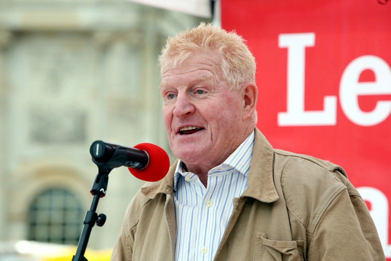 Die Bundestagsfraktion DIE LINKE lud auch in diesem Jahr zum Lesen gegen das Vergessen auf den Berliner Bebelplatz. Damit soll an die Bücherverbrennung von 1933 und den Umgang der Nationalsozialisten mit Andersdenkenden erinnert werden. Die Werke der Autoren, deren Bücher verbrannt wurden, kann man neu auflegen, die verbrannten Menschen bleiben verloren.